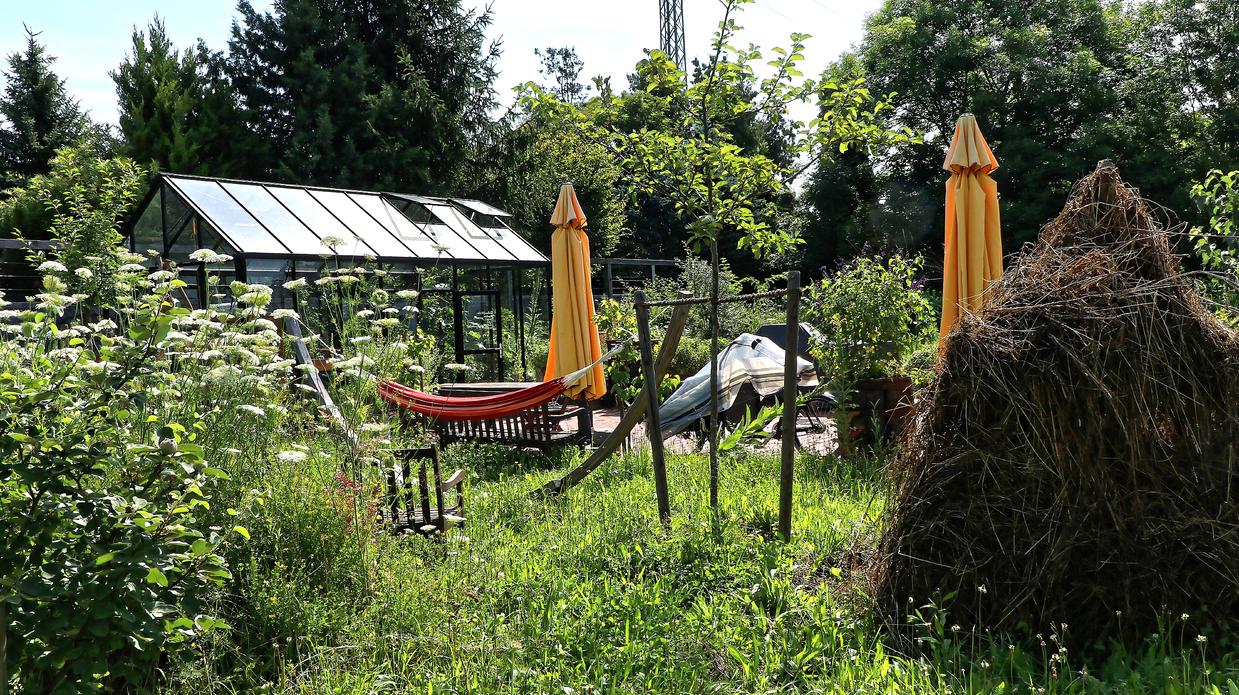 Querbeetgarten im Außengelände des Bayerischen Rundfunks in München-Freimann.